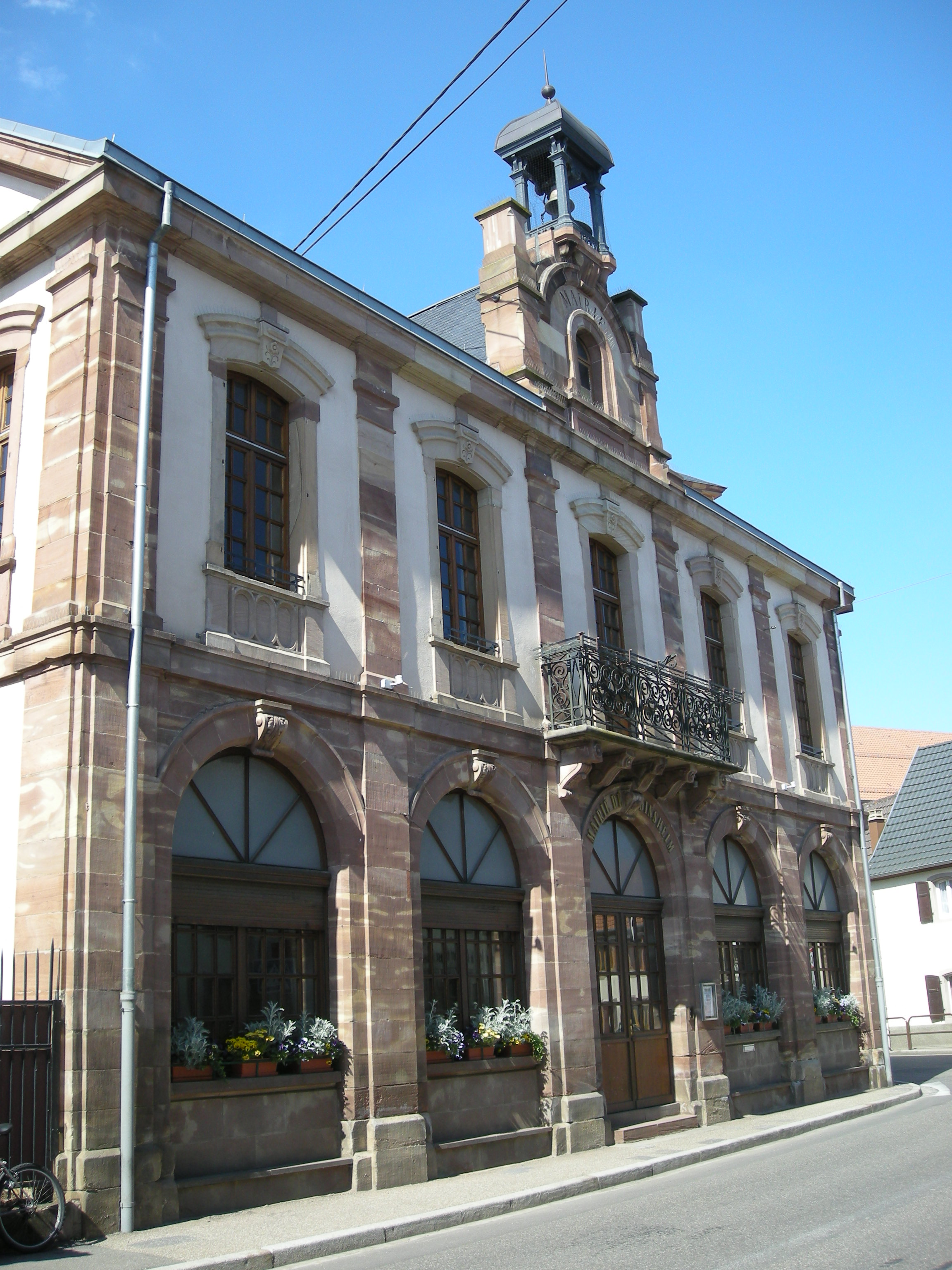 La mairie de Dinsheim-sur-Bruche (Bas-Rhin) .